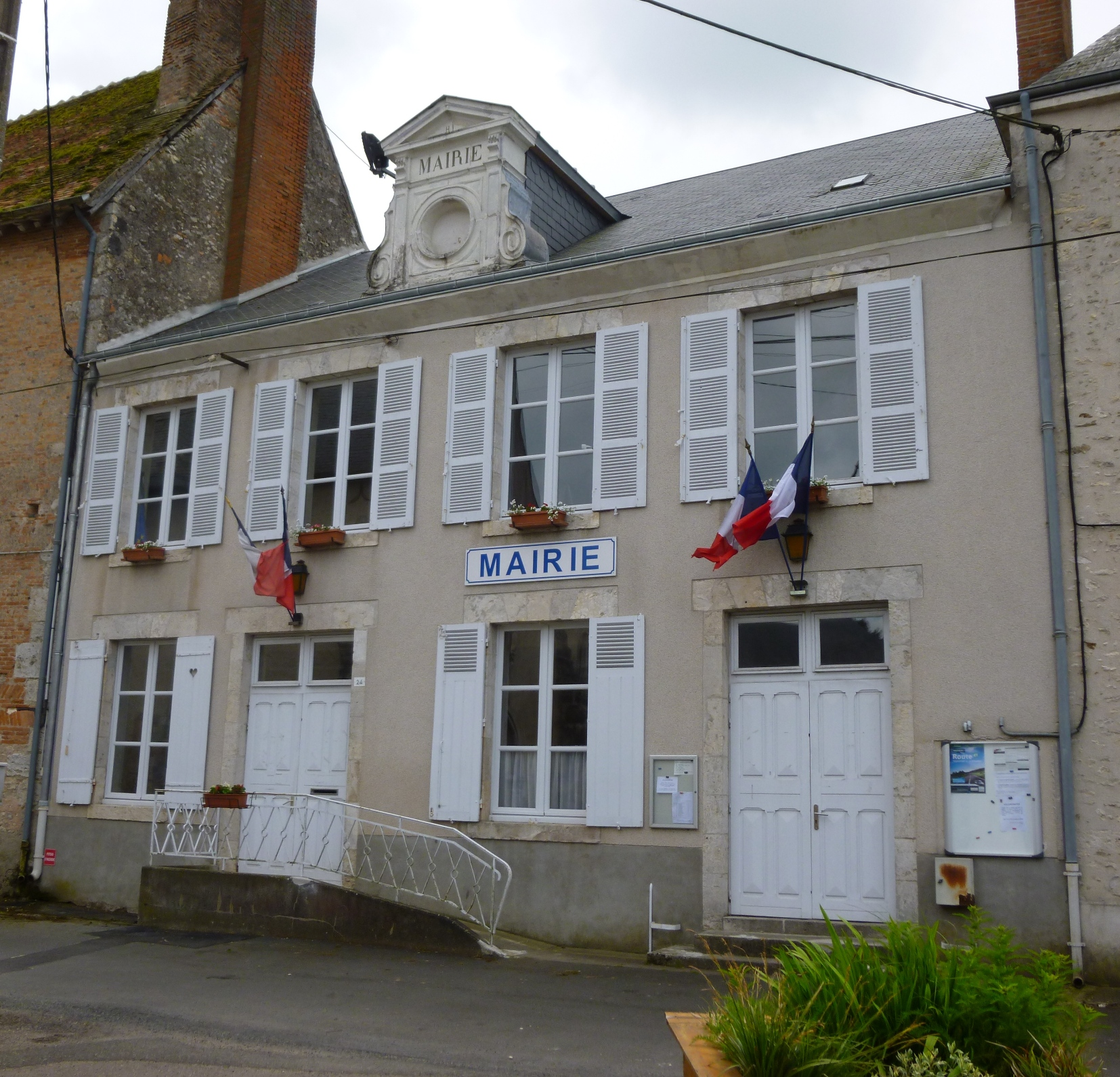 La mairie